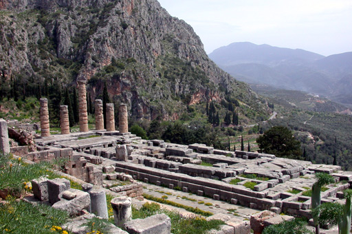 Description : Grèce, Delphes, Temple d'Apollon Date : 13 avril 2004 Auteur : Ifernyen Source : Archives personnelles Statut : GFDL